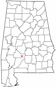 Map